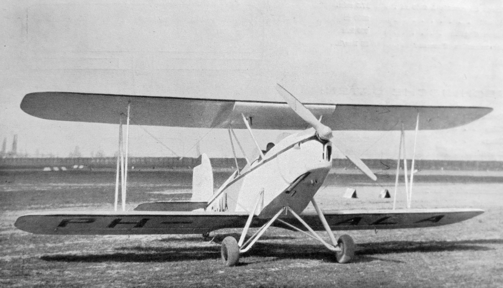 letecký motor Walter Minor 4 a letoun Koolhoven F.K.46L (1936)